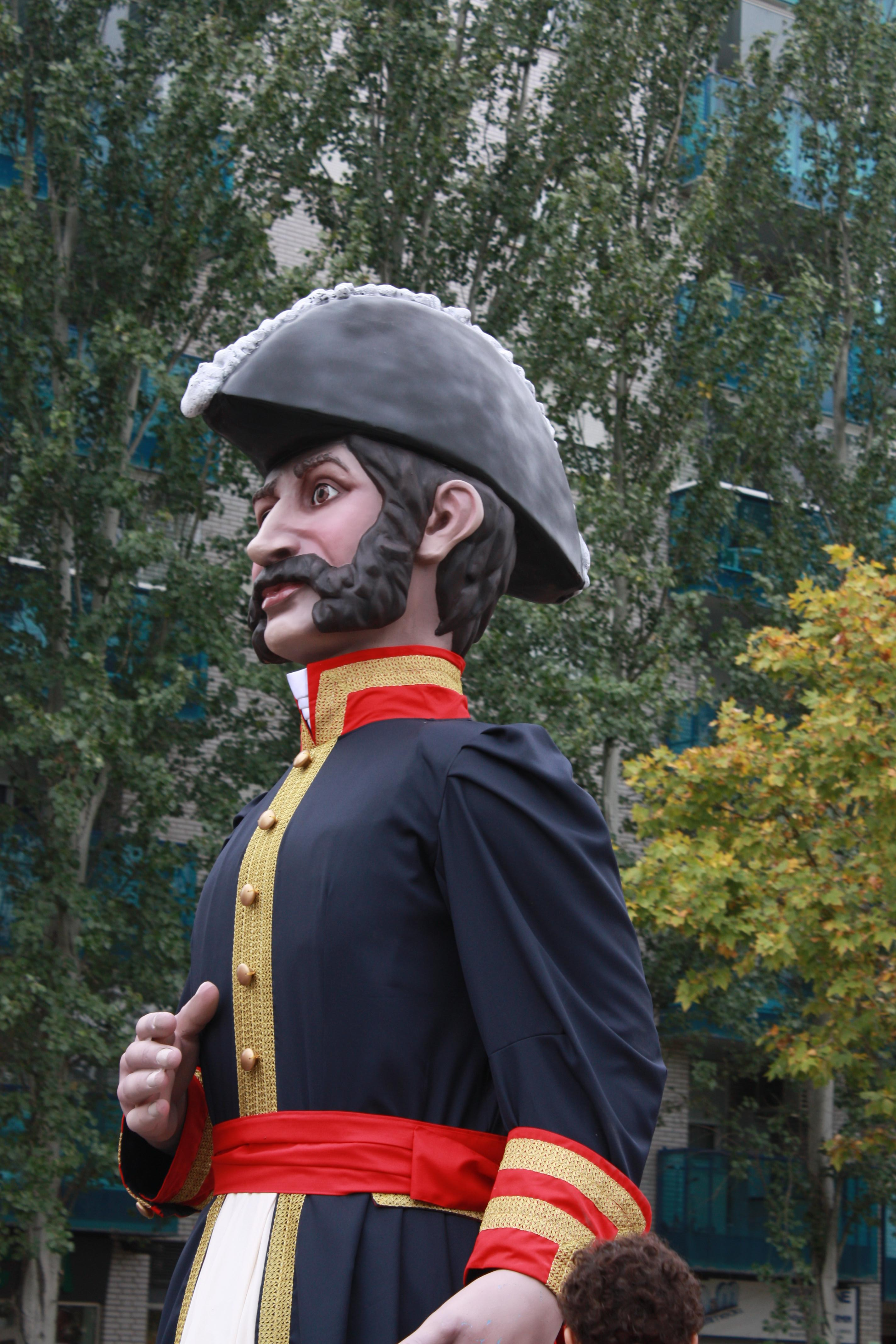 Gigantes, Palafox